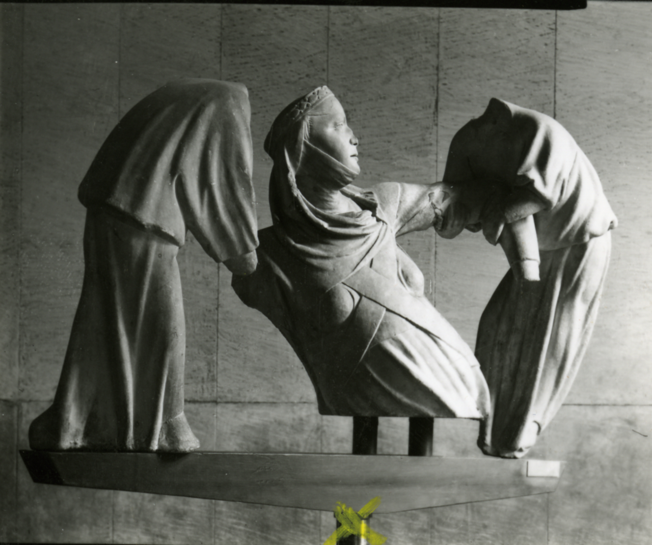 Genova. Galleria di Palazzo Bianco. Giovanni Pisano, "Monumento funebre a Margherita di Brabante", 1313-1314, frammento in marmo con la defunta sollevata dalla tomba da due angeli-diaconi, su supporto mobile metallico. Oggi conservato al Museo di Sant'Agostino, Genova. Servizio fotografico : Genova, 1965 / Paolo Monti. - Fototipi: 2 : Positivo b/n, gelatina bromuro d'argento/ carta, provino a contatto da pellicola 10x12. - ((Serie costituita da 2 provini a contatto dei negativi identificati con i nn.: 10499,10549. . - Al verso delle stampe manoscritti i numeri dei negativi corrispondenti. - La suddetta serie è contenuta nella scatola dei contatti identificata con il n. 07; sul coperchio iscrizione didascalica manoscritta a pennarello nero: "Contatti/ Architet.". - Oggi conservati al Museo di Sant'Agostino, Genova. - Occasione: Documentazione della Galleria di Palazzo Bianco. - Fonte: Agenda di Paolo Monti: Monti/ 2/ 6 giugno 1964 - 31 marzo 1966/ 8194-12420 (1964-1966), presso Archivio Paolo Monti. - Fonte: Fattura di Paolo Monti: IV. Commesse/ Fattura n. 15 (1967/02/28), presso Archivio Paolo Monti. 4 riprese fotografiche Linhoff 10x12 sculture Palazzo Bianco foto 10500/502, 10503/505